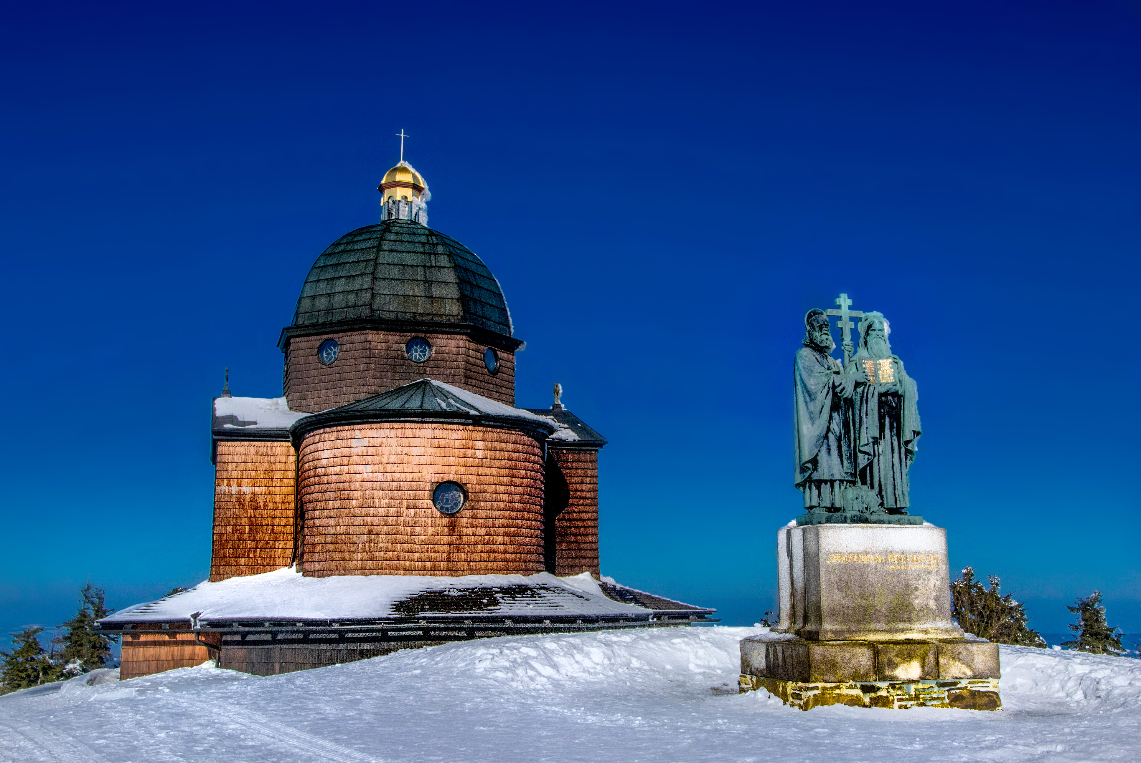 Kaple svatého Cyrila a Metoděje (Radhošť)